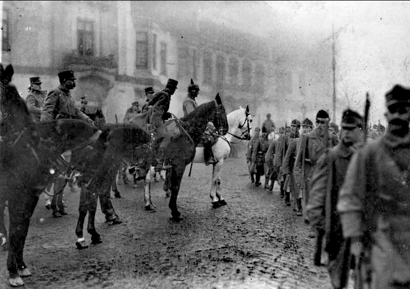 General v. Mackensen in Bukarest Parade über die einziehenden österr.- ung. Truppen